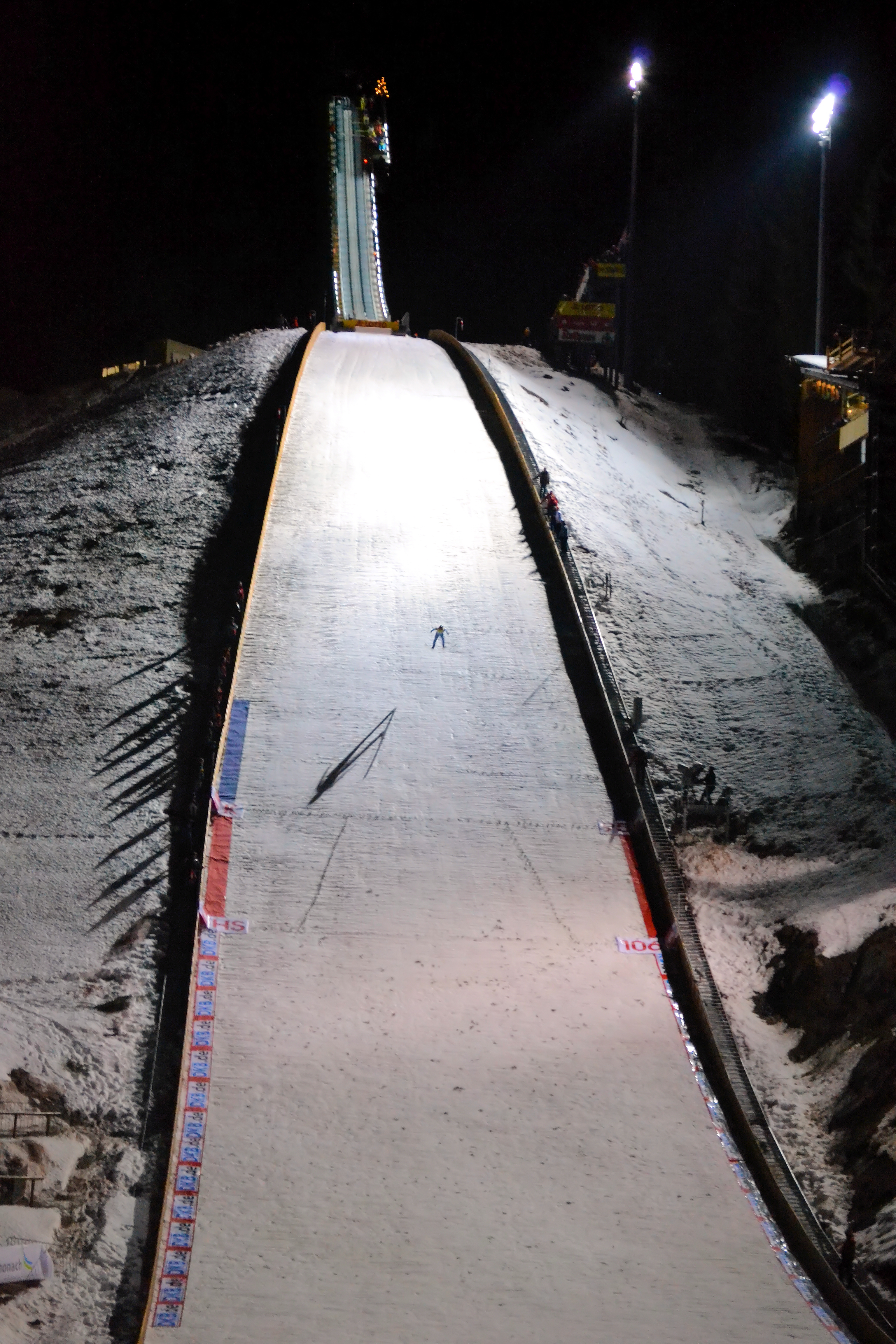 Training zum Schwarzwaldpokal 2011 in Schonach auf der Langenwaldschanze unter Flutlicht